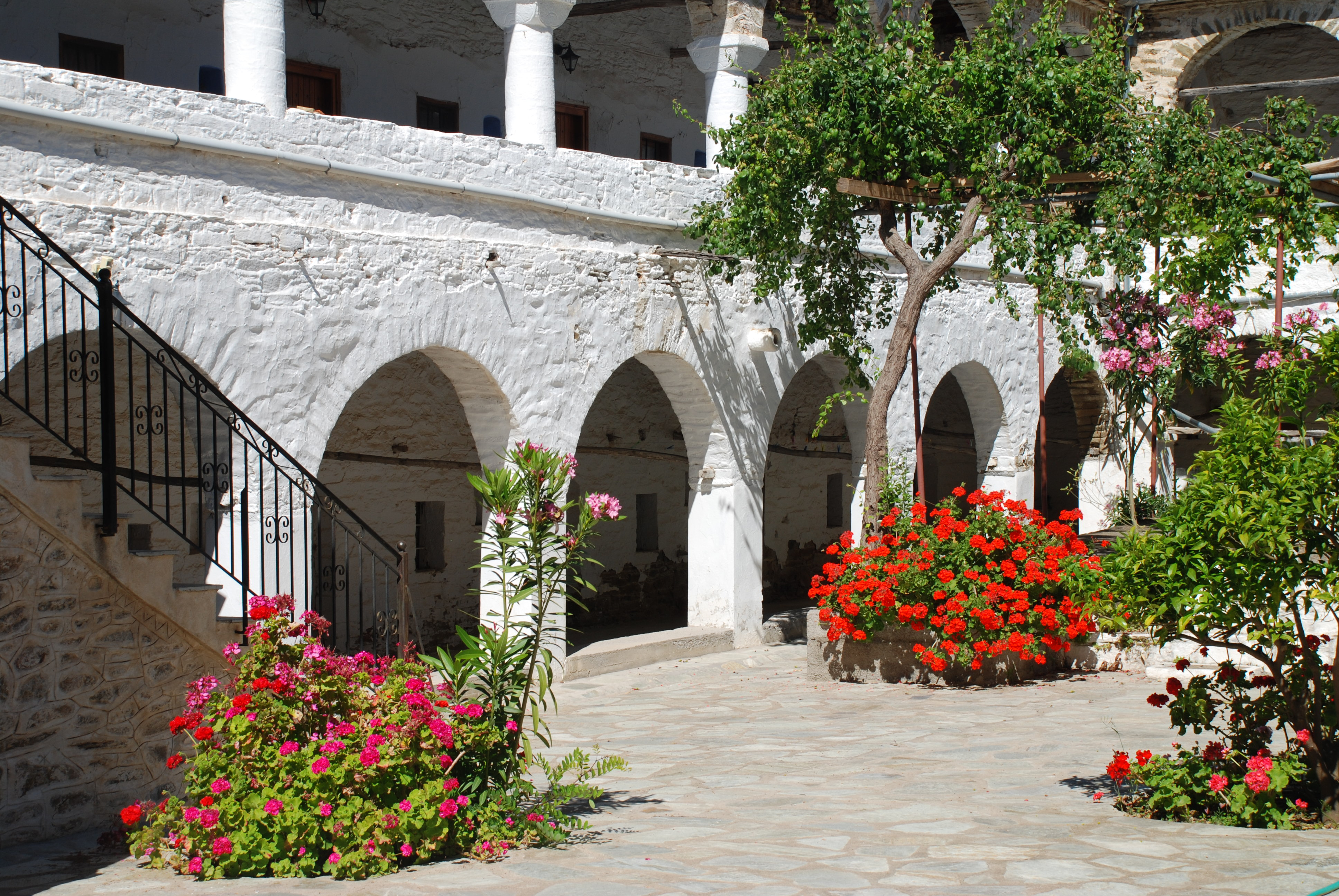 Monastery on Trikeri Island